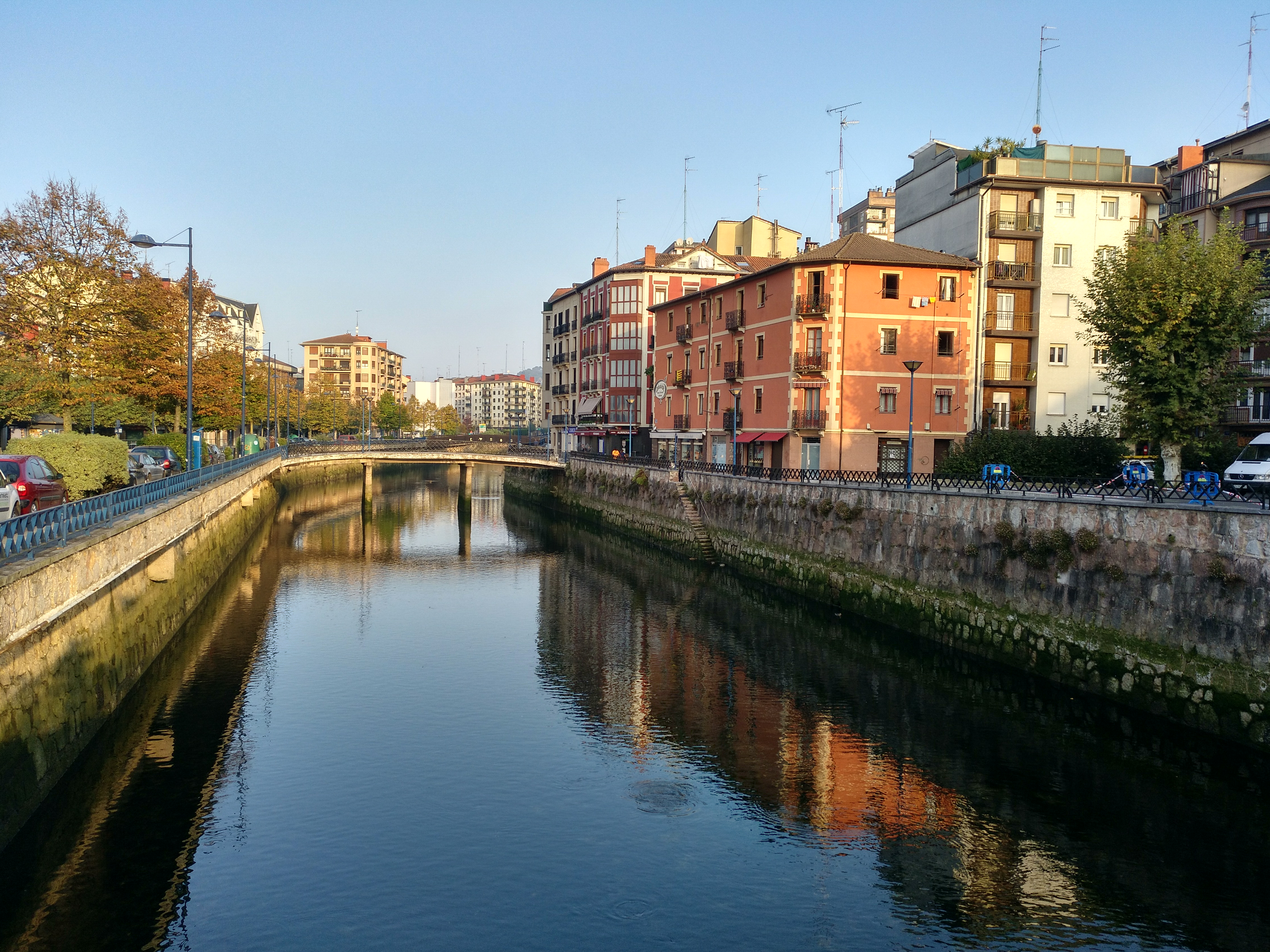 Oiartzun Errenteriako Ugarritze auzoaren parean